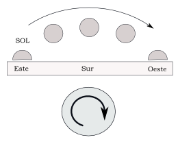 AUTHOR: Francisco Javier Blanco González PAÍS: España IMAGEN: el movimiento diurno del Sol Image made by Inkscape (.svg to .png)